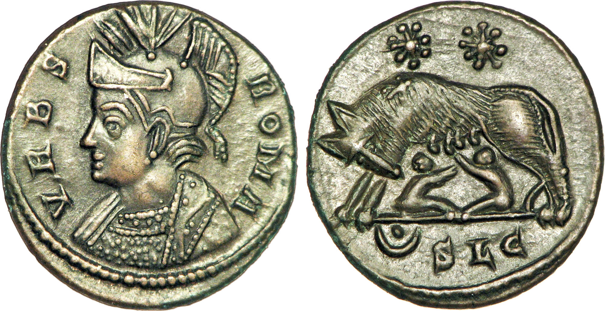 // (croissant pointé)SLG. Description revers : La louve à gauche, allaitant Romulus et Rémus ; au-dessus, les deux étoiles des Dioscures (les Gémeaux, Castor et Pollux).